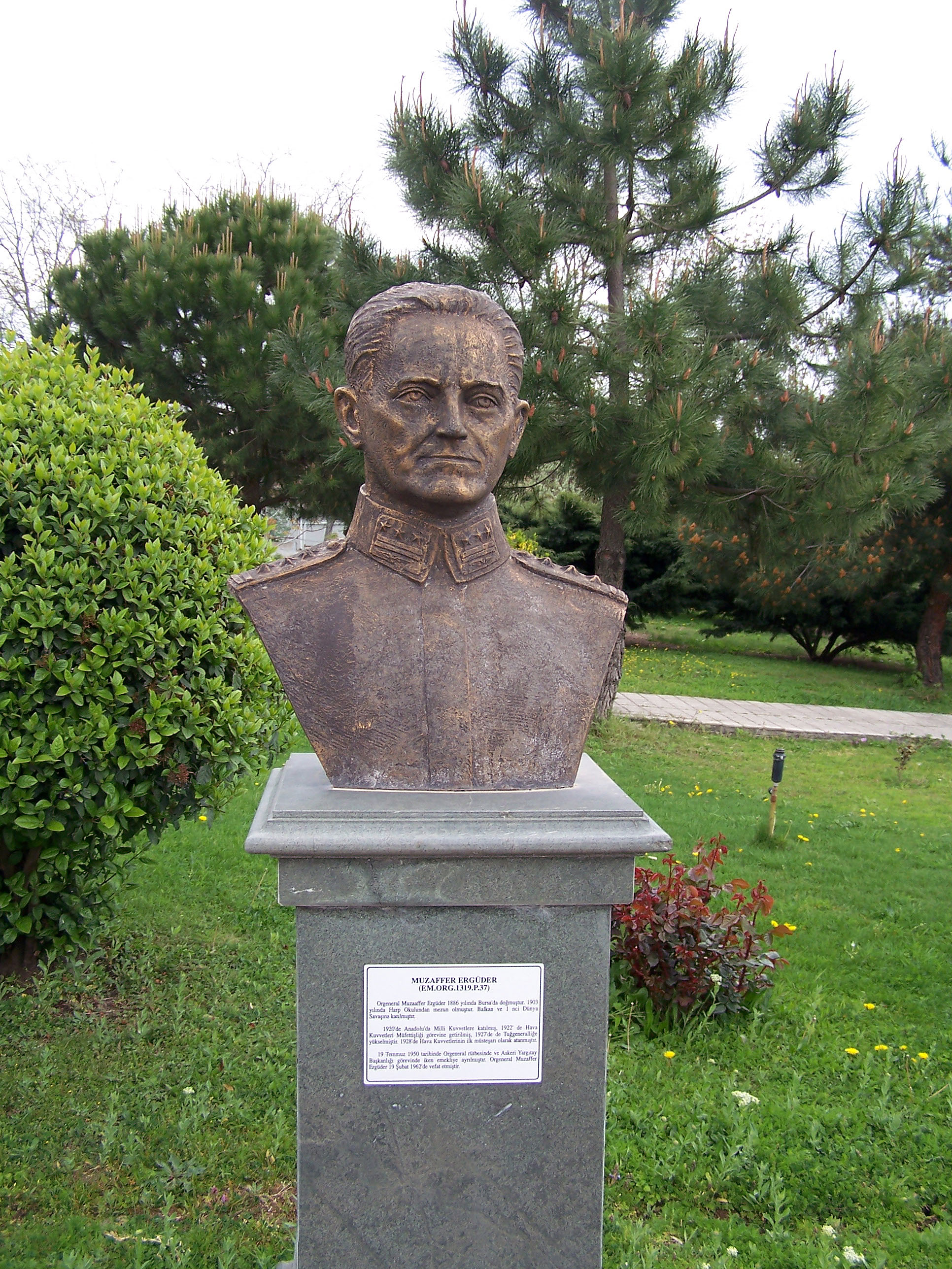 Bust of General Muzaffer Ergüder in Istanbul Aviation Museum (İstanbul Havacılık Müzesi)